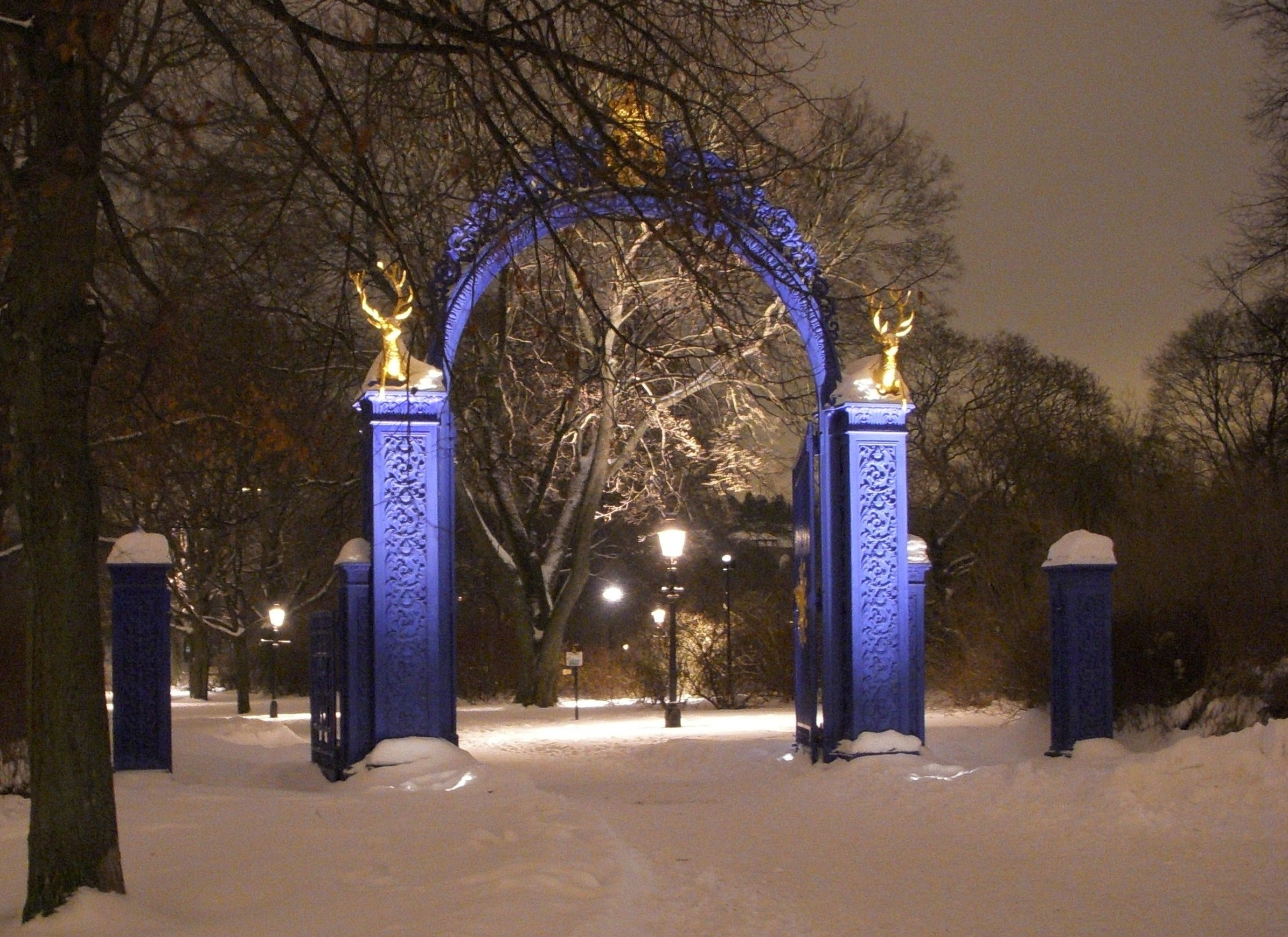 "Blå porten" på Djurgården i Stockholm